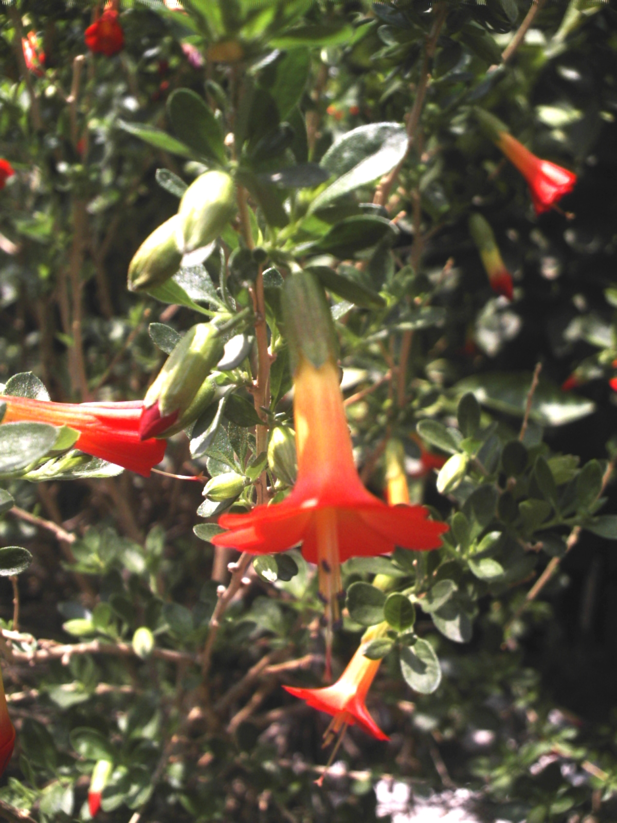 Cantua buxifolia Esta es la flor nacional de Bolivia, tiene los colores rojo , amarillo y verde igual que su bandera.